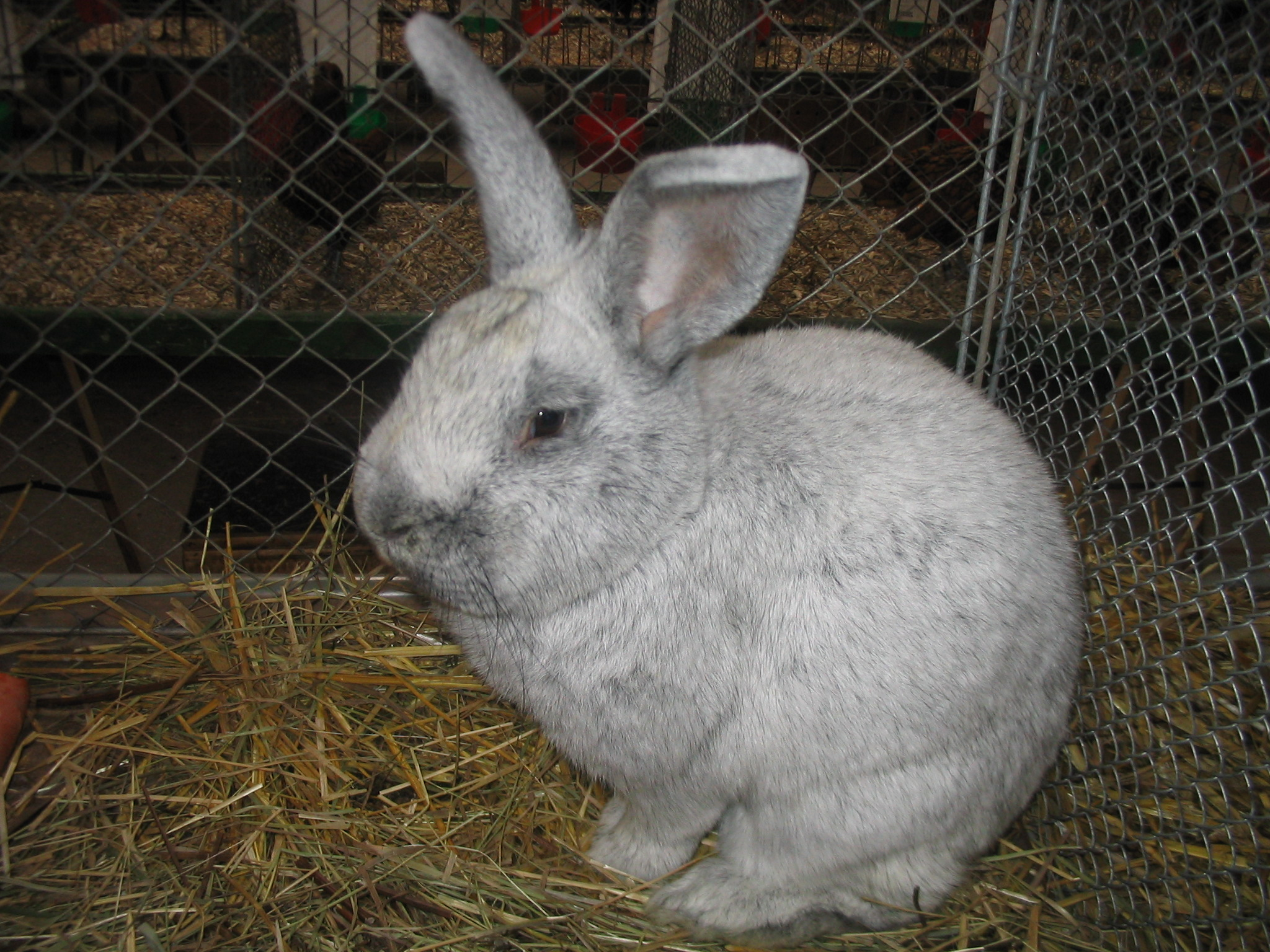 Oryctolagus cuniculus, Hauskaninchen, Domestic Rabbit, Rasse: Heller Großsilber Fotografiert: 06.10.2004, Dr. Hagen Graebner